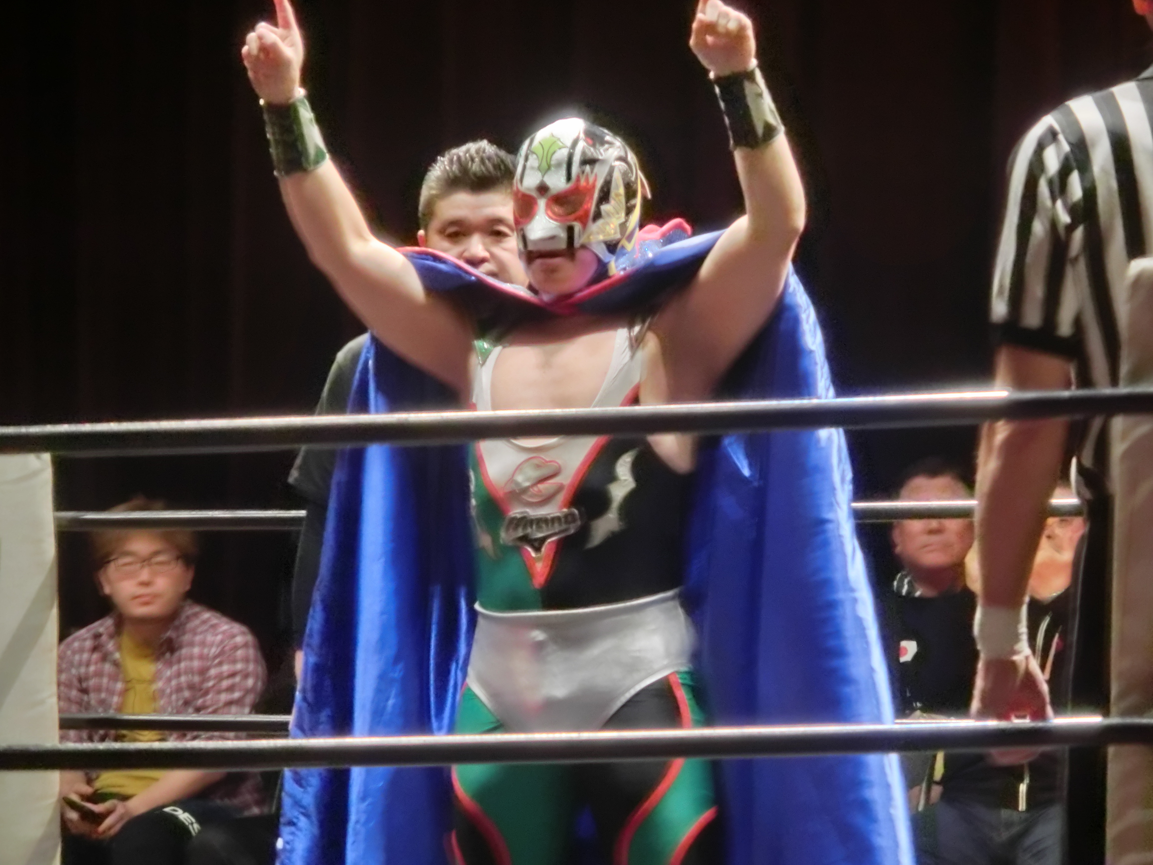 Masa Saito mourning performance